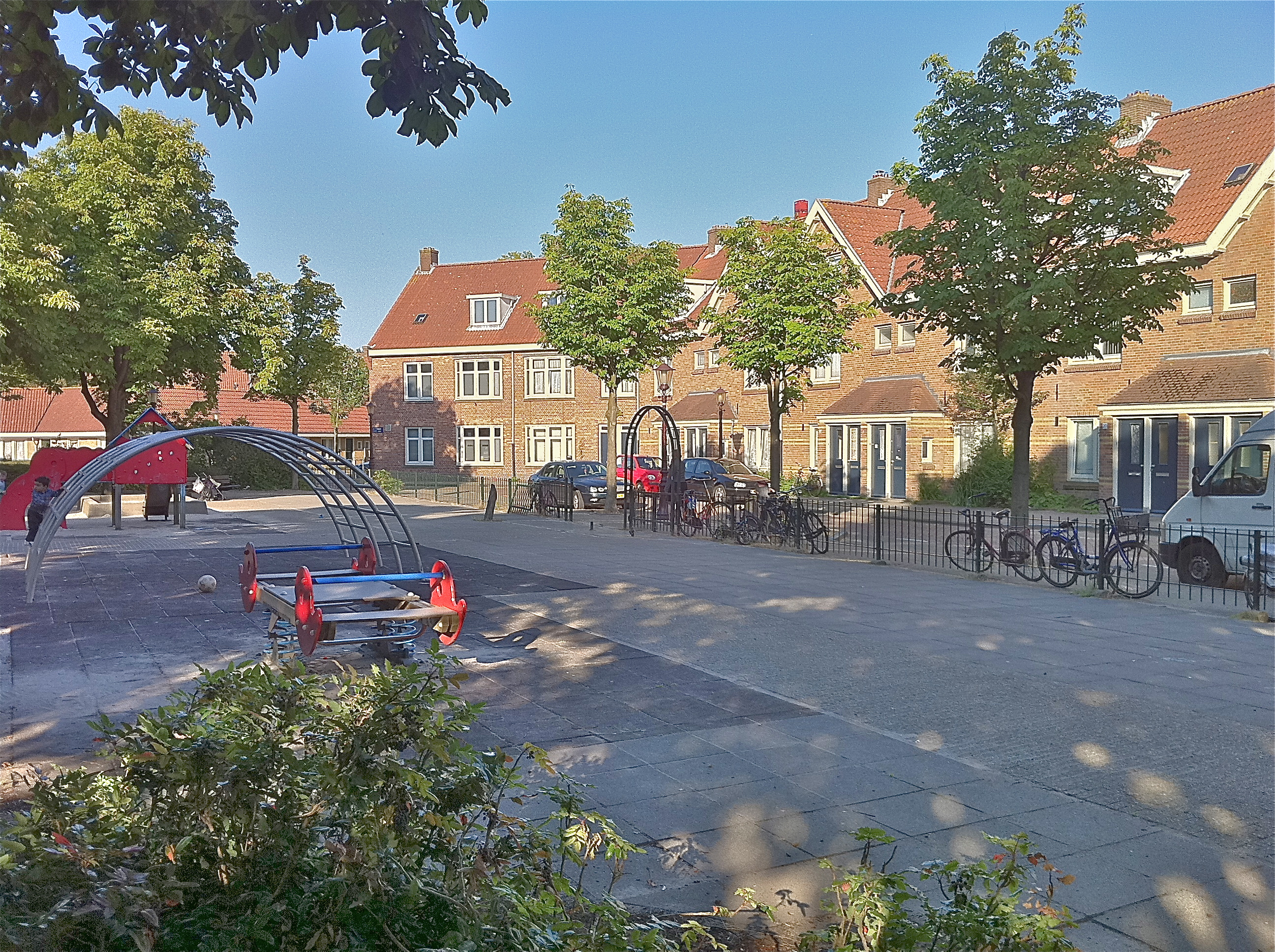 Van der Pekbuurt Amsterdam-Noord in juli 2011